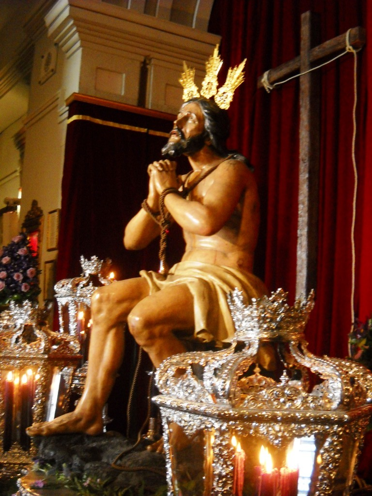 Besamanos del Cristo de las Penas